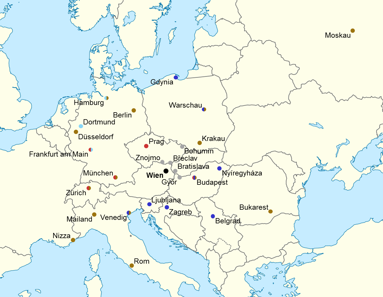 Endbahnhöfe, die direkt ab Wien Hbf angefahren werden. RJ ICE EC EN R/REX